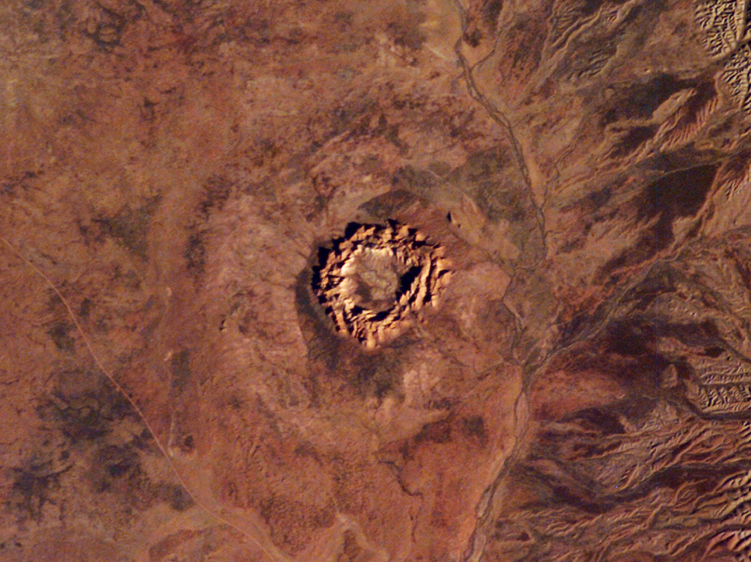 Impaktkrater Gosses Bluff Northern Territory Australien